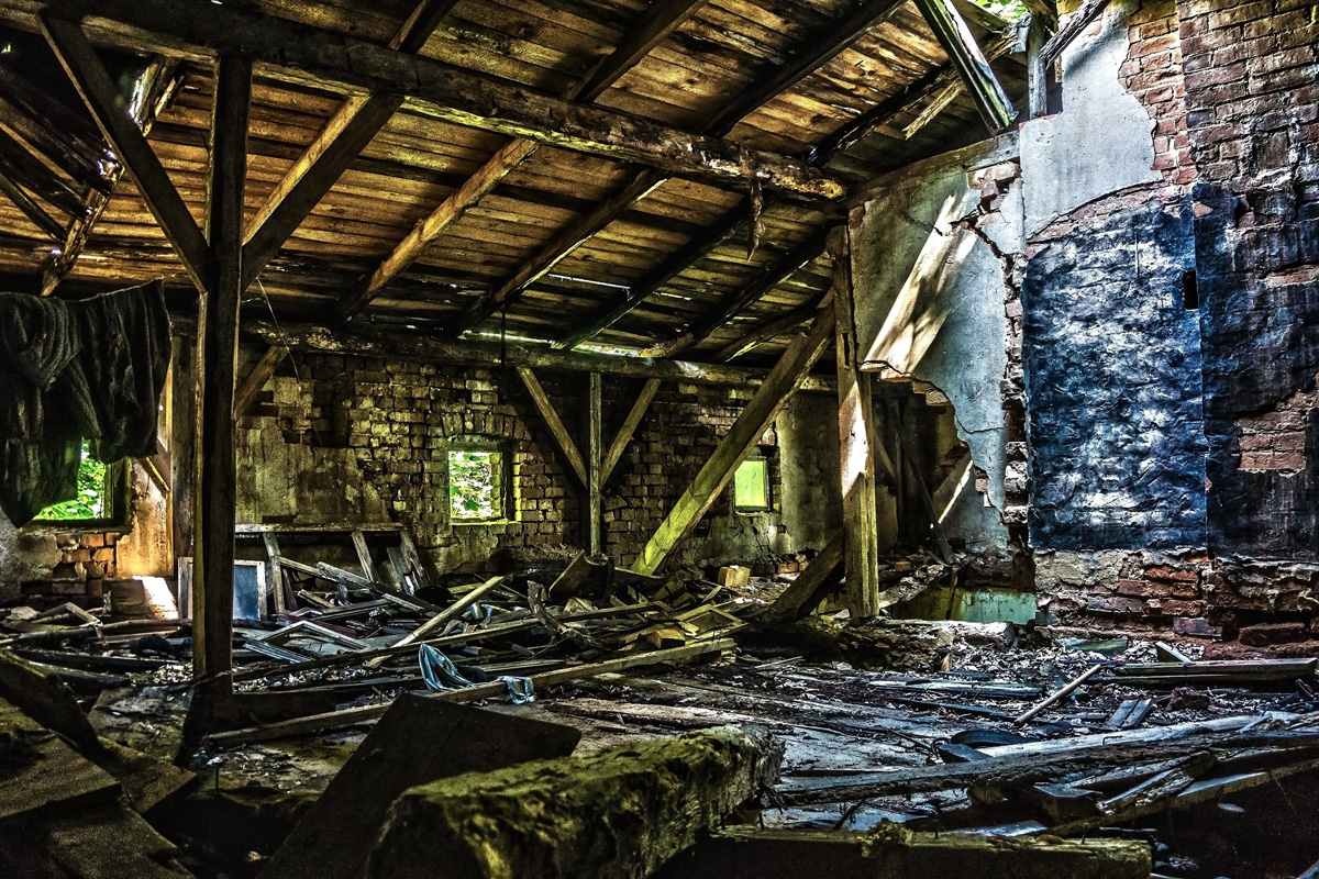 Dom narodzin Ludwik Rydygiera w Dusocinie. Stan z czerwca 2014 roku.